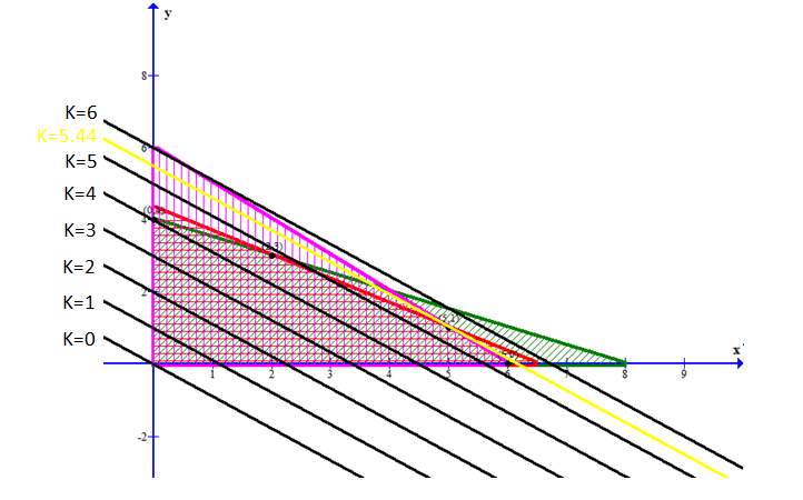 Resolució gràfica del mètode 2.